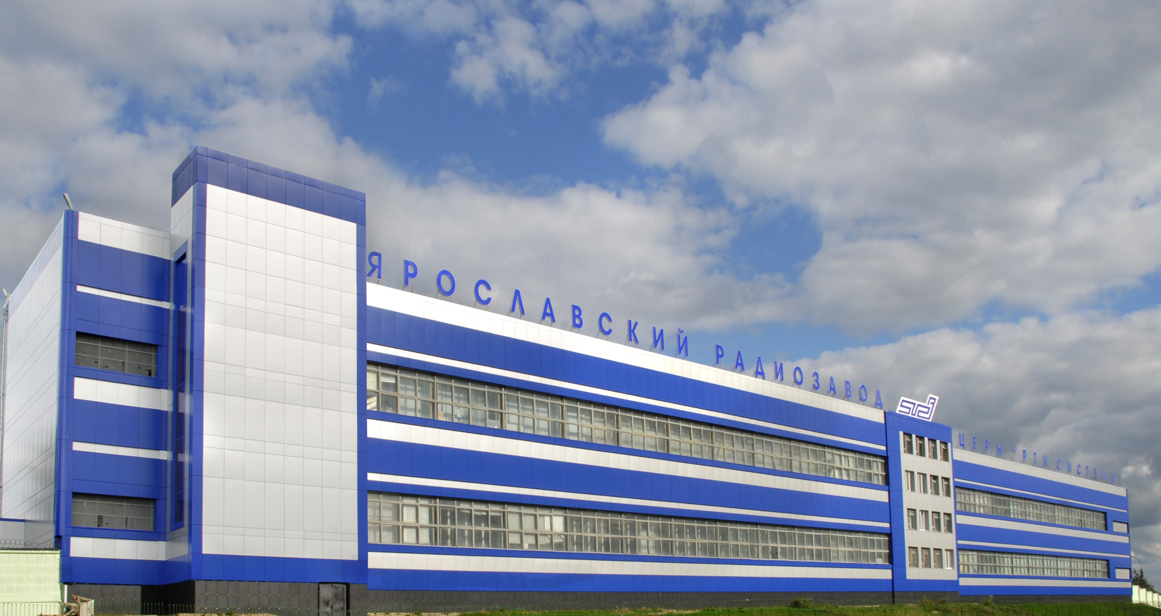 Сборочное производство